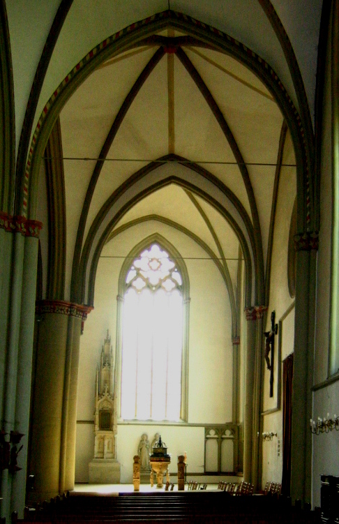 Südliches Seitenschiff, St. Marien zu Lemgo.